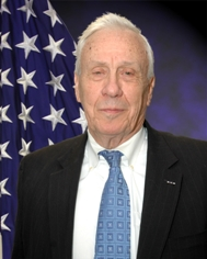 Charles E. Allen